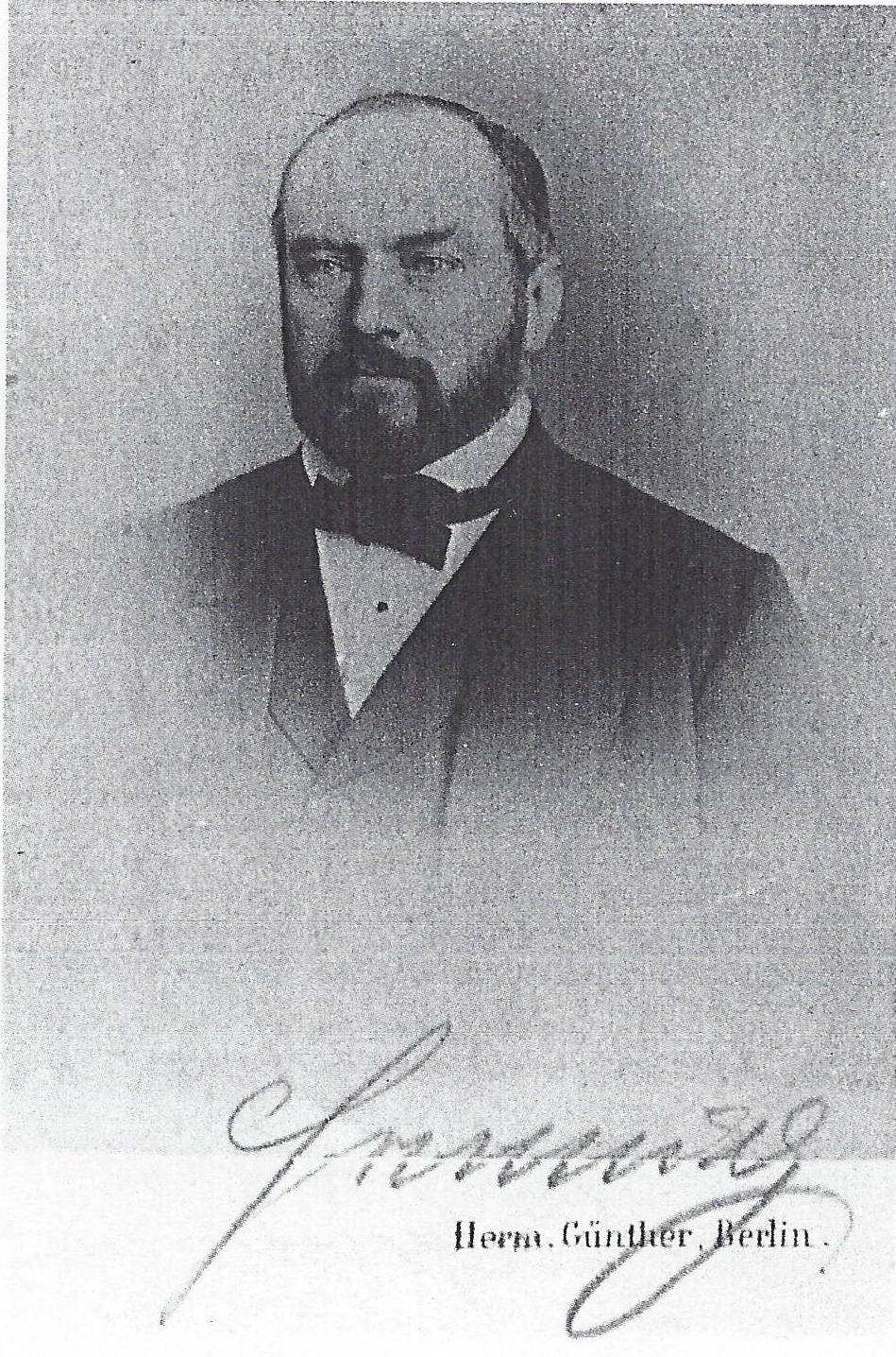 Signierte Porträtfotograie von Julius Karl August von Hennig (1822-1877)